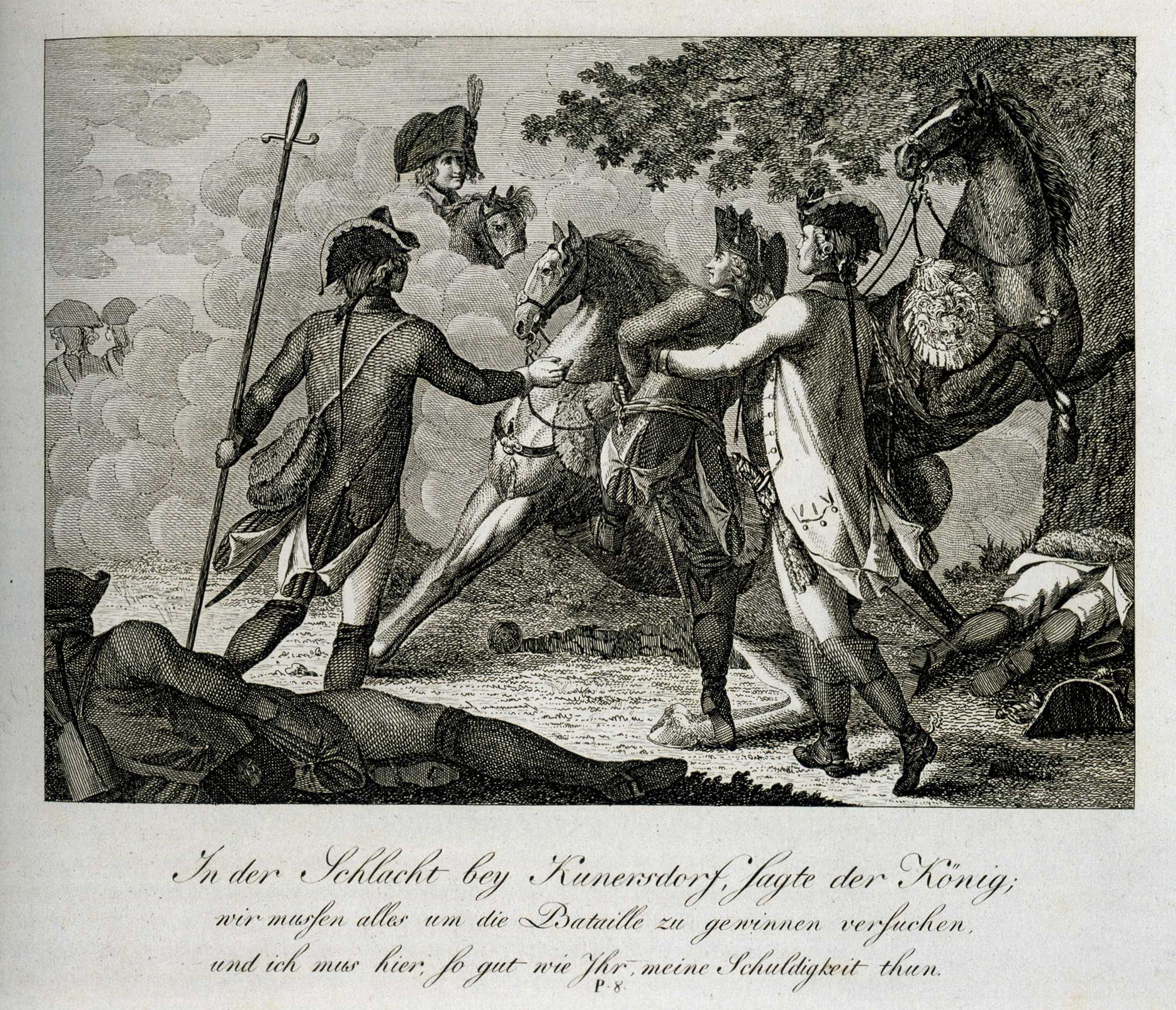 Friedrich II. von Preußen in der Schlacht bei Kunersdorf 1759. Radierung. Stiftung Preußische Schlösser und Gärten, GK II (10) 1392